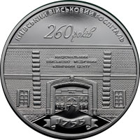 260 років Київському військовому госпіталю реверс